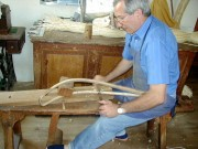 Chistera : ossature